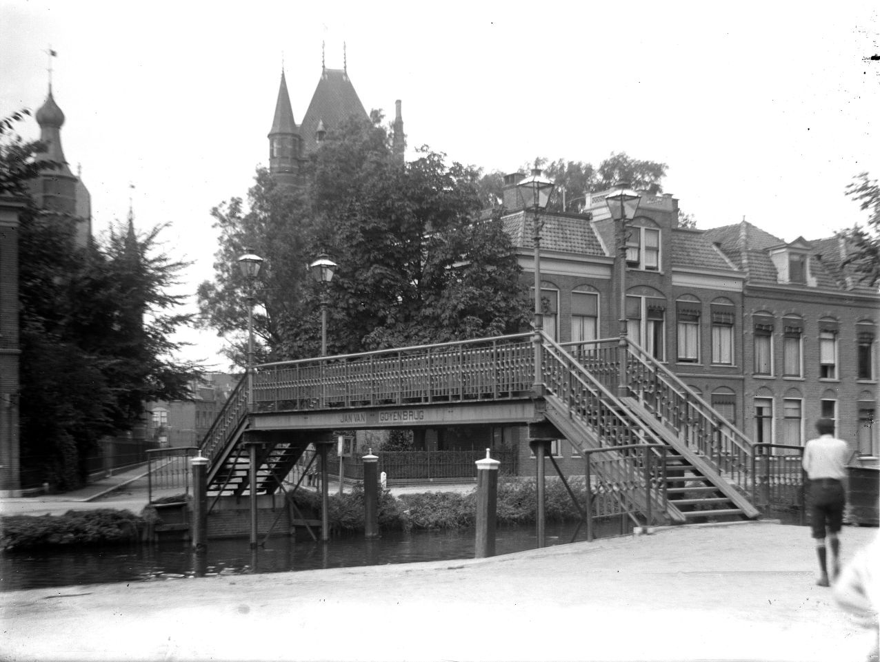 Gezicht op de Jan van Goyenbrug vanaf de Schelpenkade in Leiden (Beeldbank Regionaal Archief Leiden)